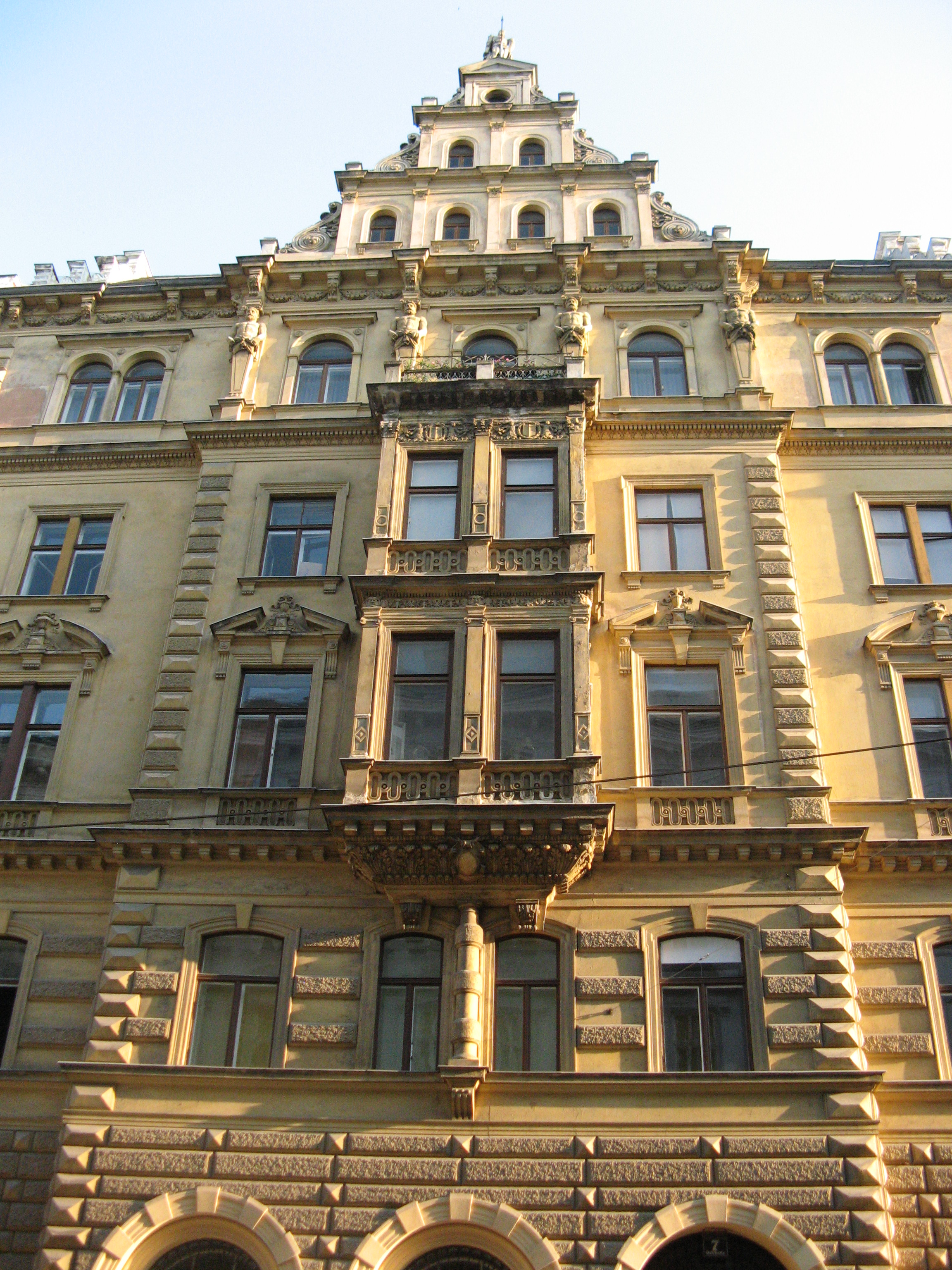 Haus (1873-74) von Josef Hudetz und Moritz Hinträger, Doblhoffgasse 7, Wien-Innere Stadt